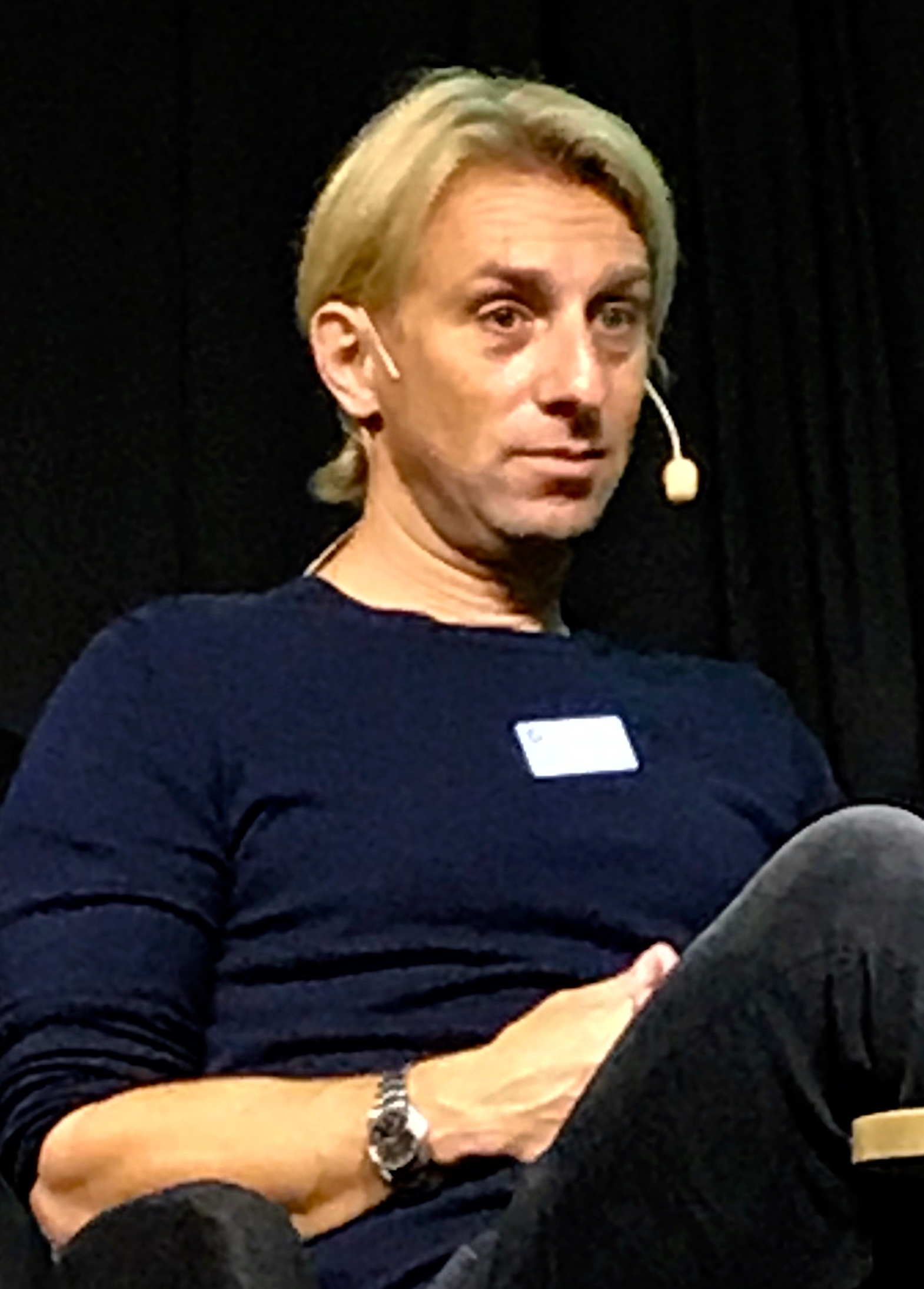 Anders Hansen 2019, Bokmässan i Göteborg